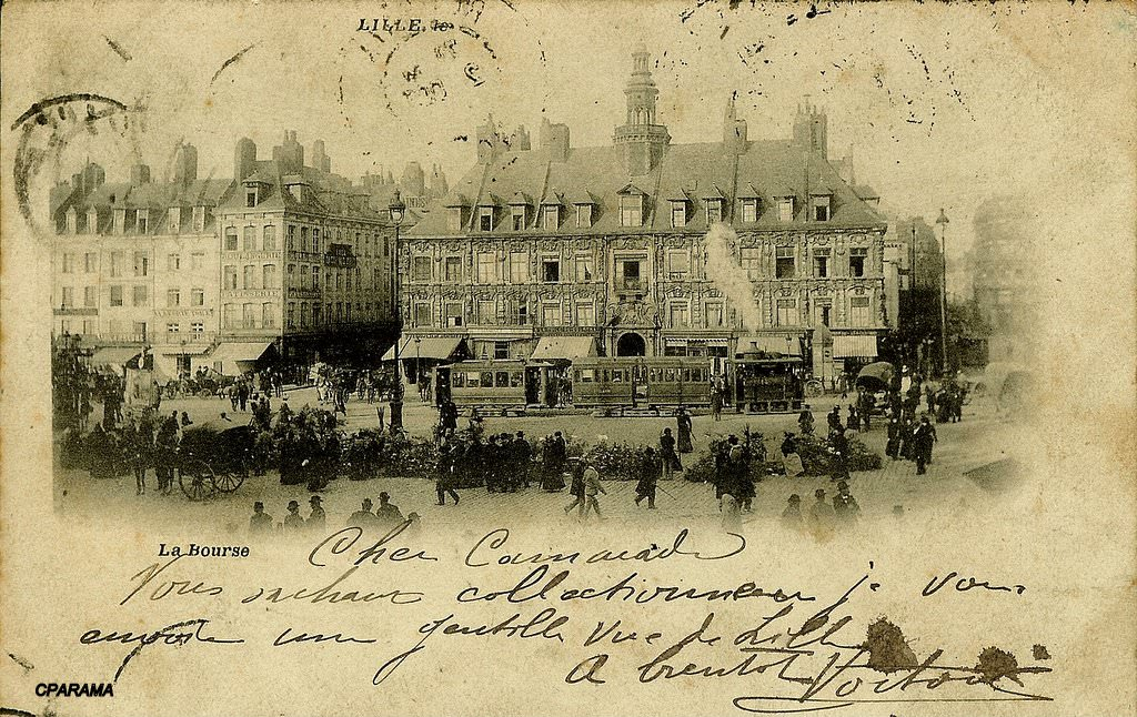 Carte postale Titre : LILLE La Bourse Description : Vue de la Grand-Place et de la bourse lors du marché aux fleurs. Au second plan stationne une rame à vapeur de la ligne F des TDN.